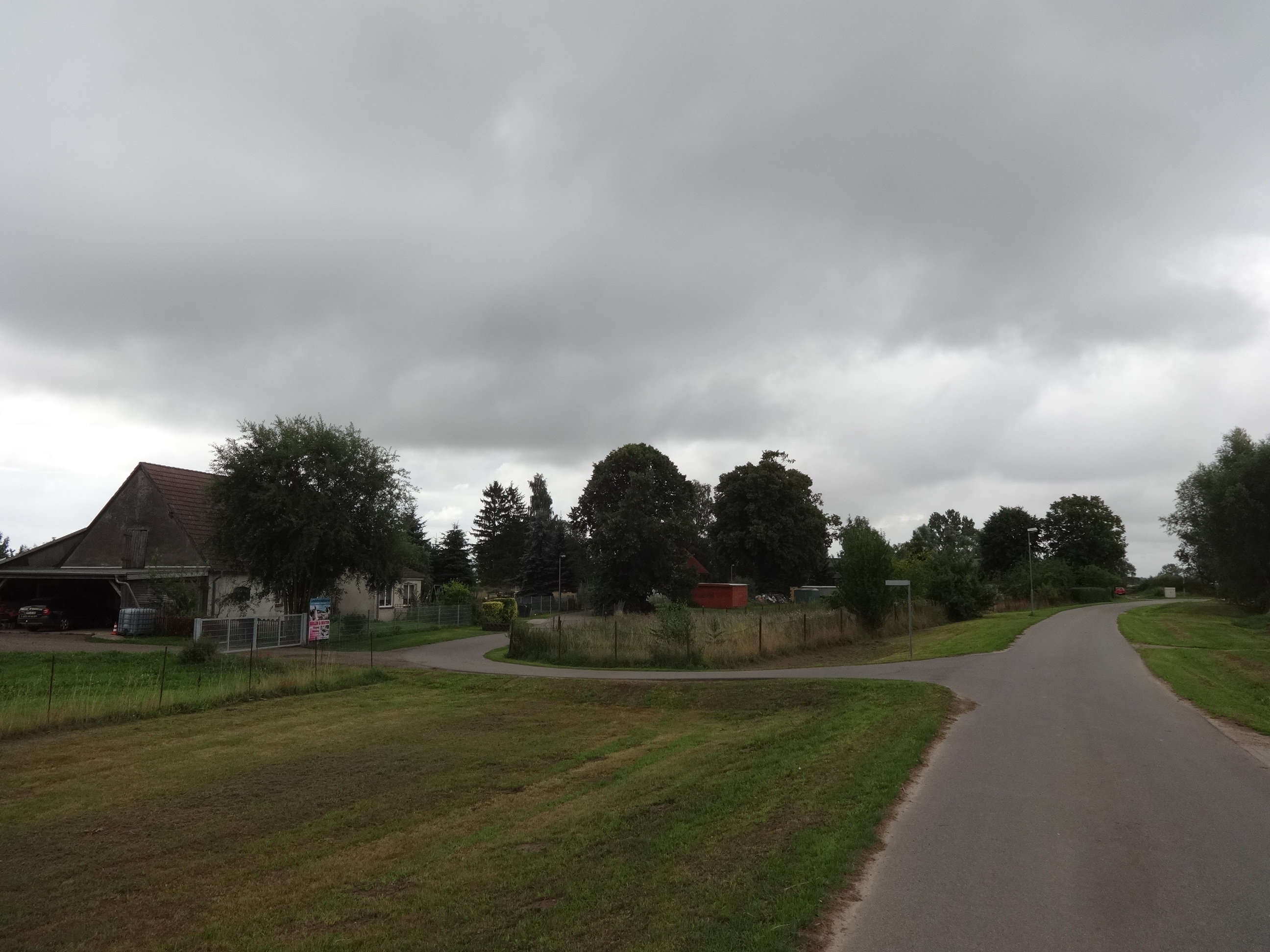 Dorfstraße in Busdorf, ein Ortsteil der Gemeinde Behrenhoff in Mecklenburg-Vorpommern